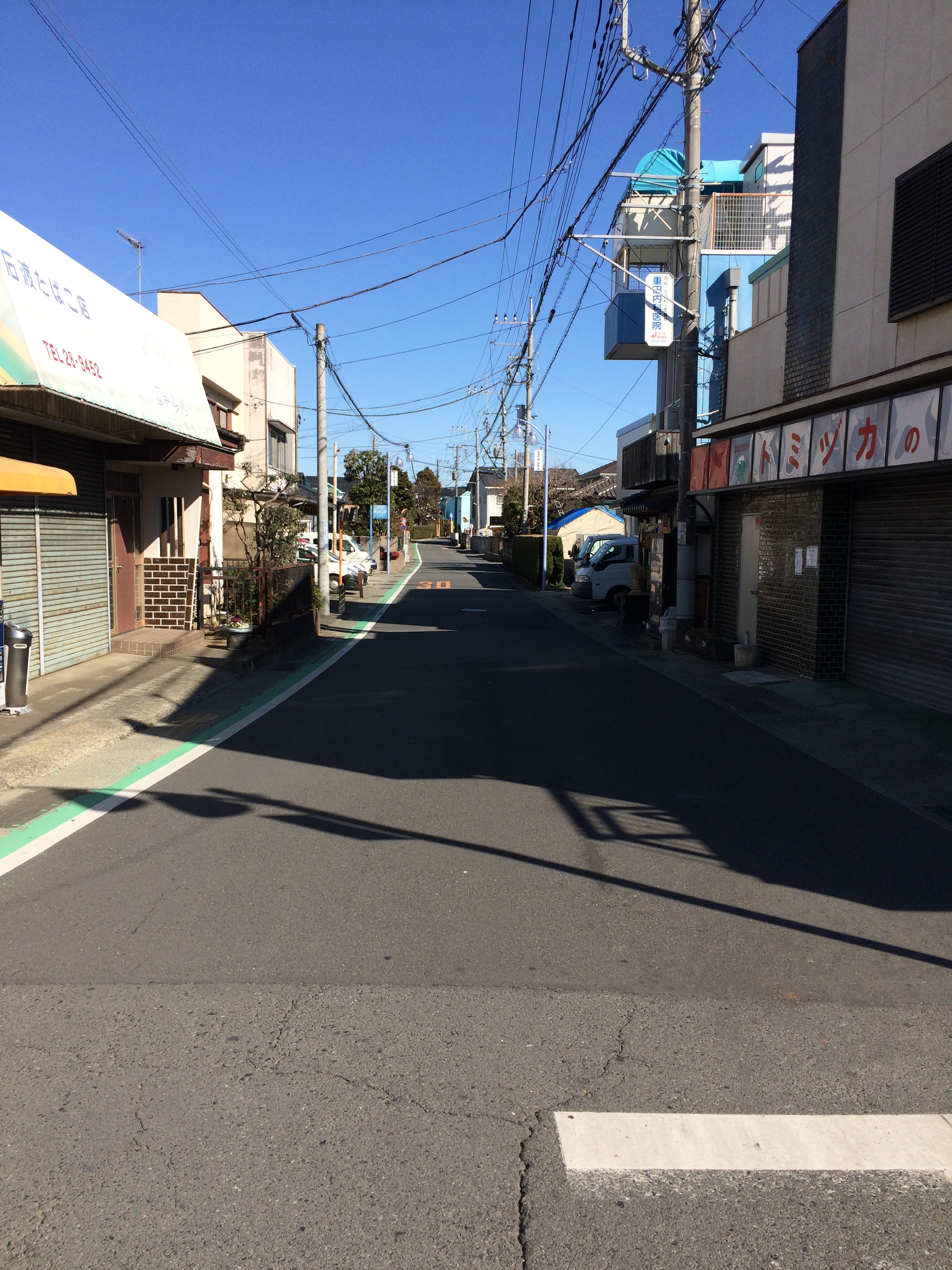 かつて愛甲宿があった場所